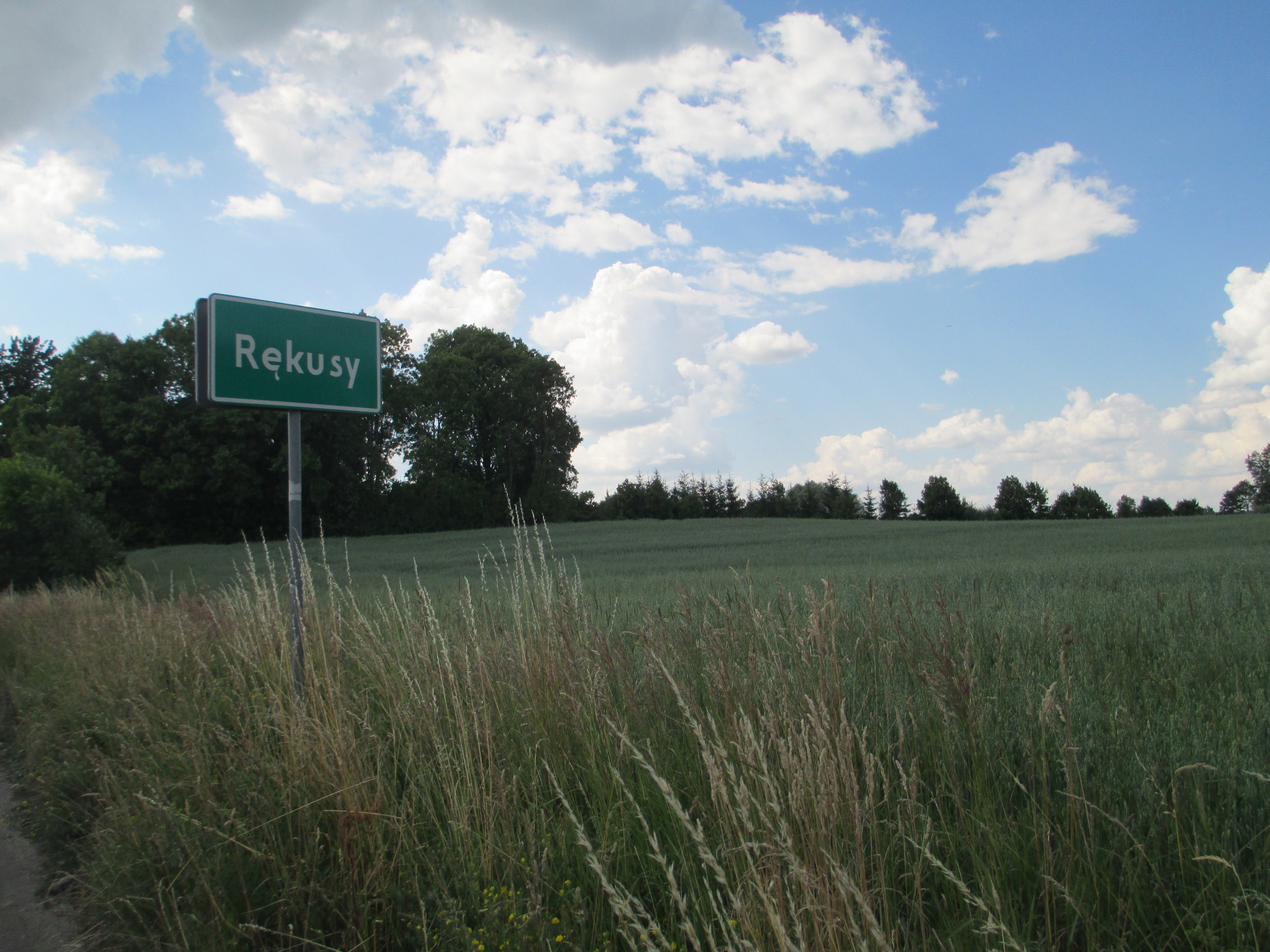 Rękusy - gm. Ełk